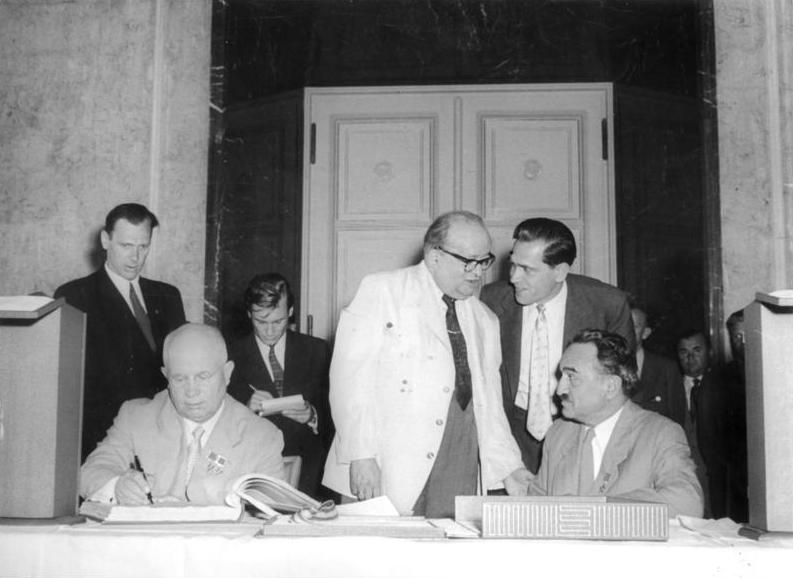 Zentralbild - Heilig, 13.8.57 / Berlin Sowjetische Partei- und Regierungsdelegation bei Oberbürgermeister Ebert Die sowjetische Partei- und Regierungsdelegation unter Leitung von N.S. Chruschtschow, Erster Sekretär des ZK der KPdSU, und A.I. Nikojan, Stellvertreter des Vorsitzenden des Ministerrates der UdSSR, stattete am 13.8.1957 dem Oberbürgermeister der Stadt Berlin, Friedrich Ebert, im Neuen Rathaus einen Besuch ab. UBz: N.S. Chruschtschow trägt sich in das Goldene Buch der Stadt Berlin ein. Links: N. S. Chruschtschow, Mitte: Friedrich Ebert, rechts: A.I. Nikojan.